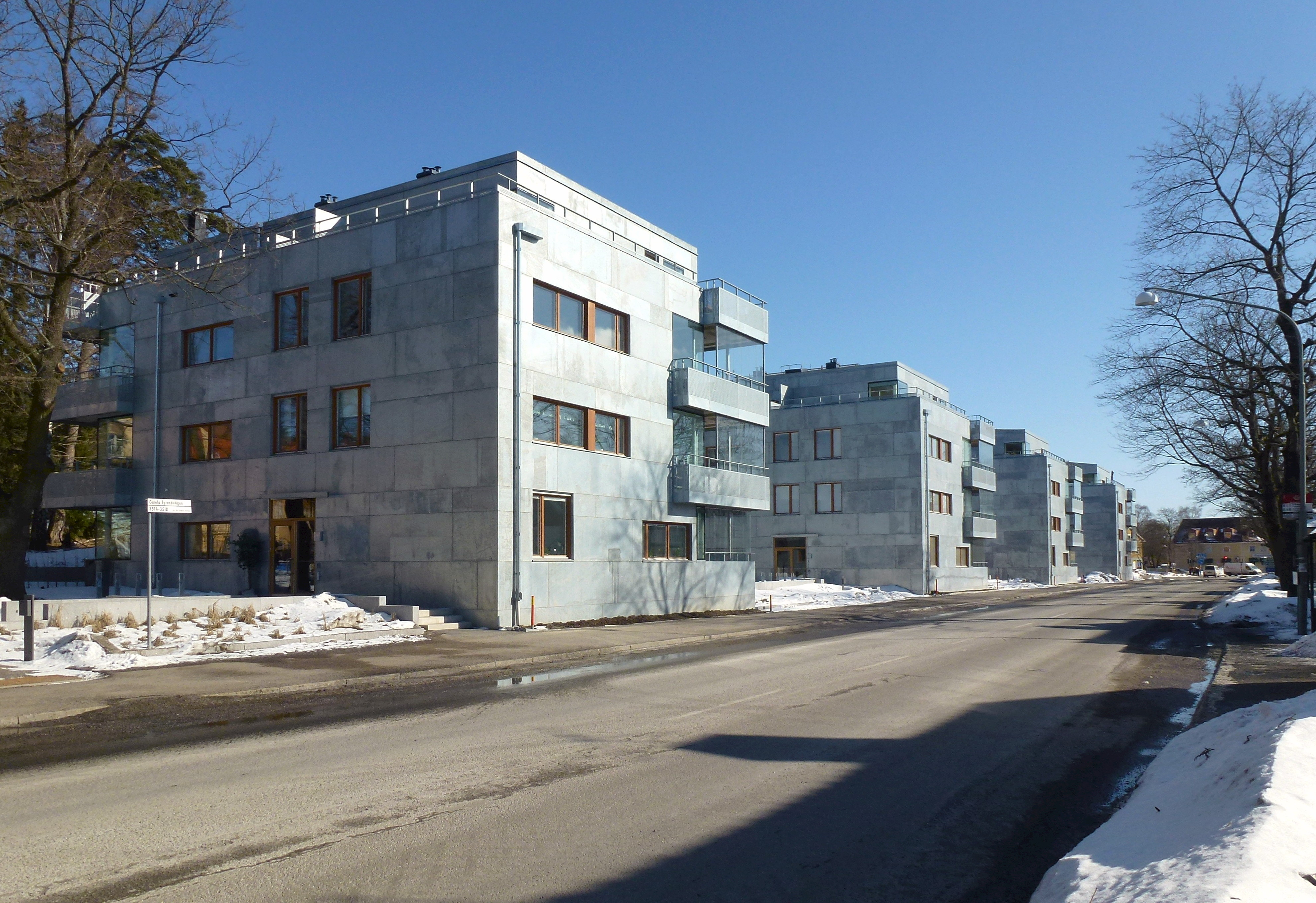 Kvarteret De gamles vänner